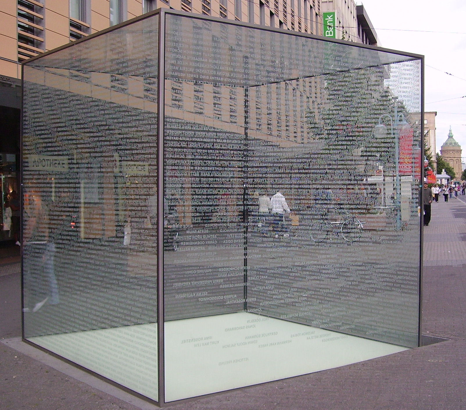 holocaust monument by Jochen Kitzbihler in Mannheim, Germany